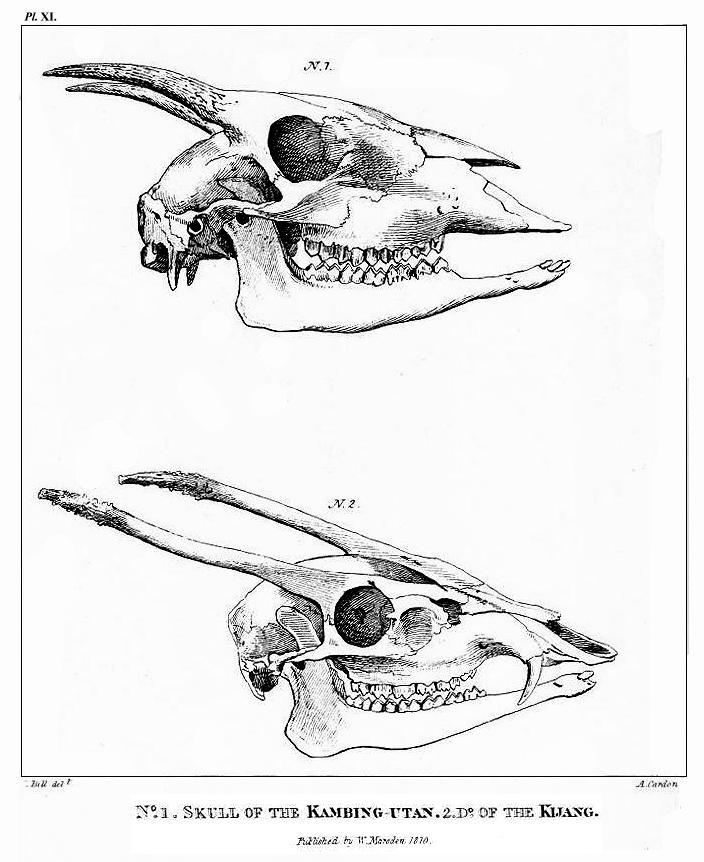 William Marsden: The History of Sumatra. Tafel XII: Schädel Kambing Utan und Kijang